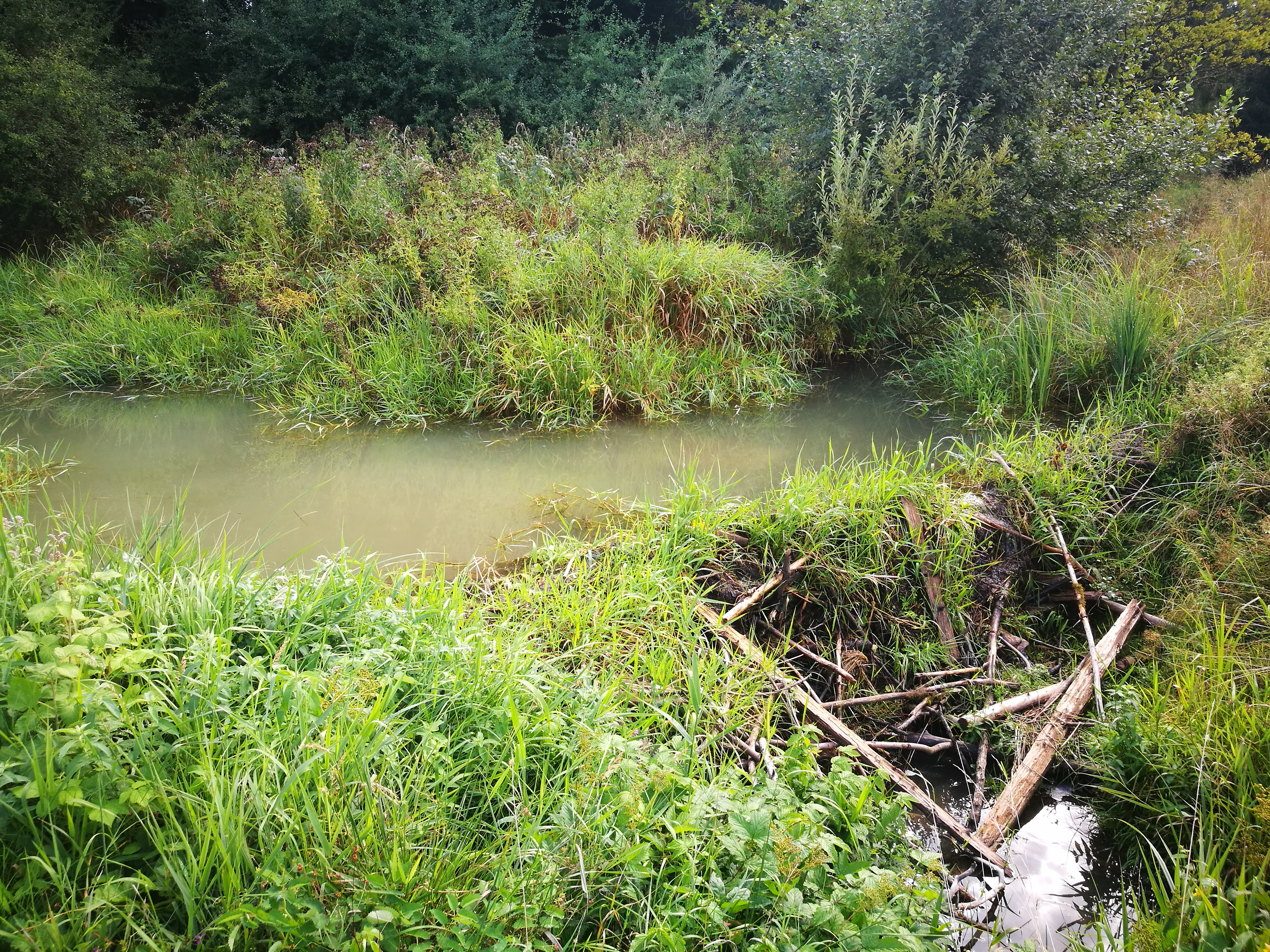 Deutschland (D) - Baden-Württemberg (BW) - Landkreis Konstanz (KN) - Gemeneinde Mühlingen - Ortsteil Gallmannsweil - Flurstück "Krumme Wiesen": Biberdamm im Oberlauf der Krummbach